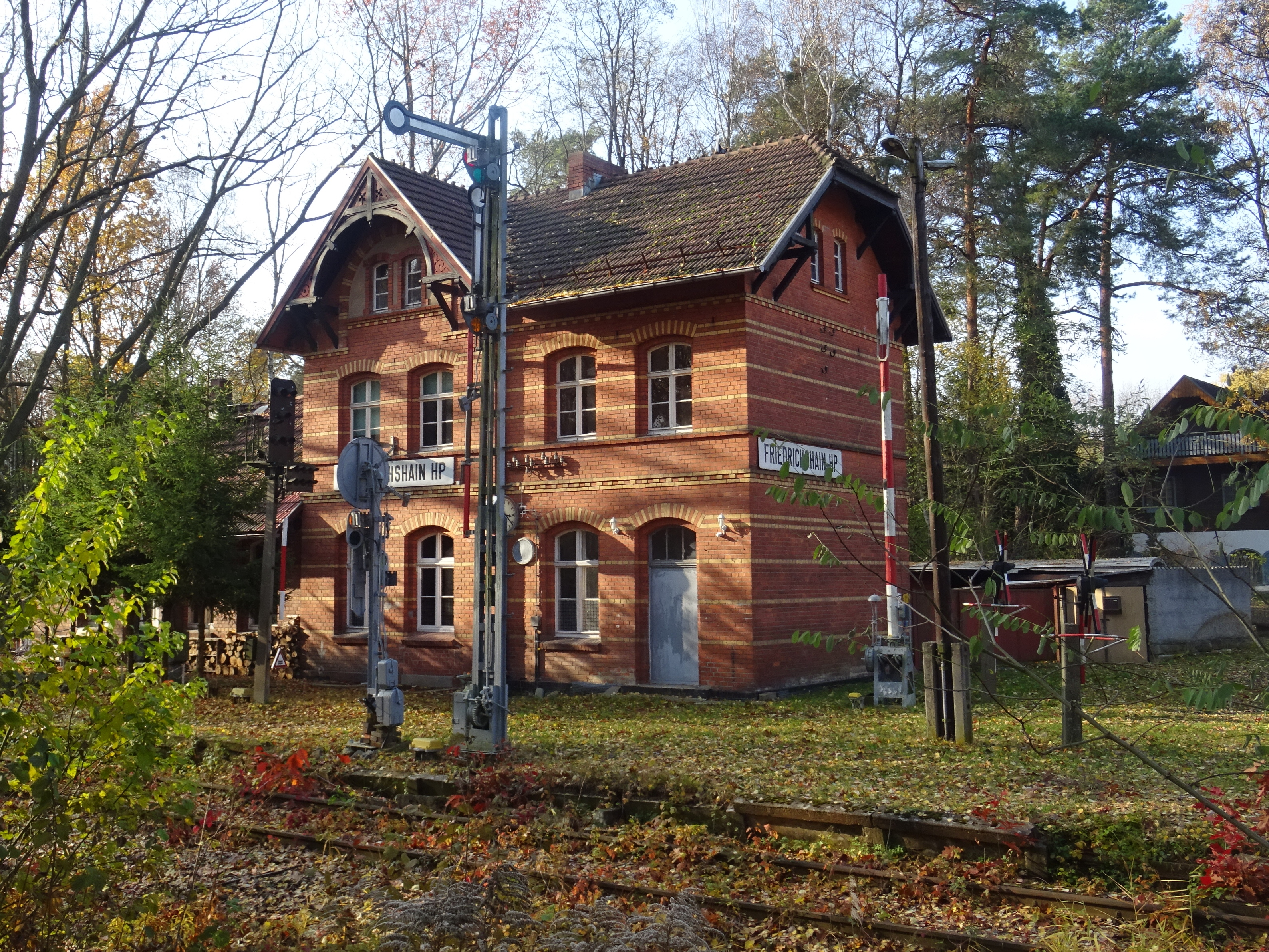 ehemaliger Bahnhof in Friedrichshain, Gemeinde Felixse